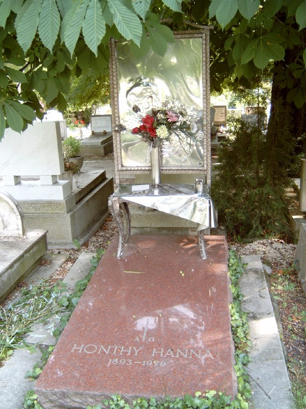 Honthy Hanna sírja Budapesten. Farkasréti temető: 25-1-61.